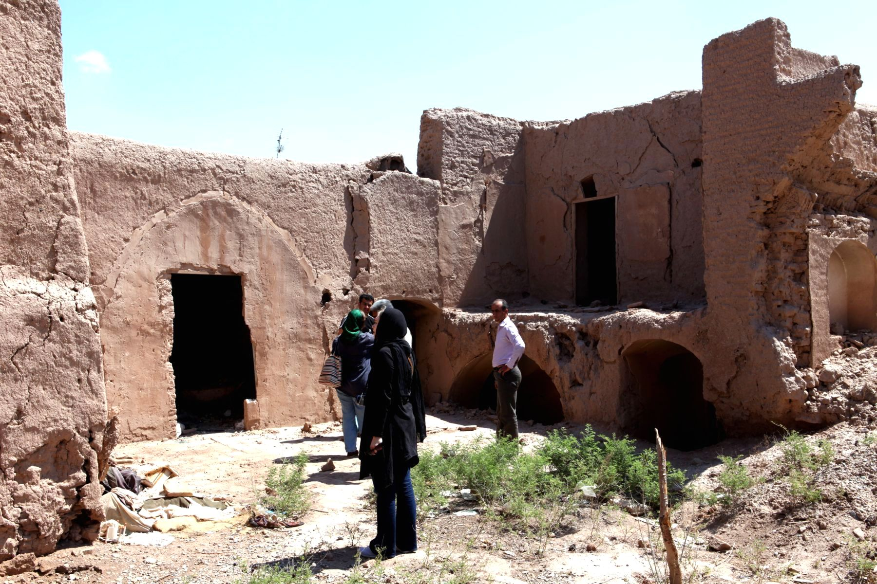 Aradan, Semnan Province. Ahmadinejad's birth place